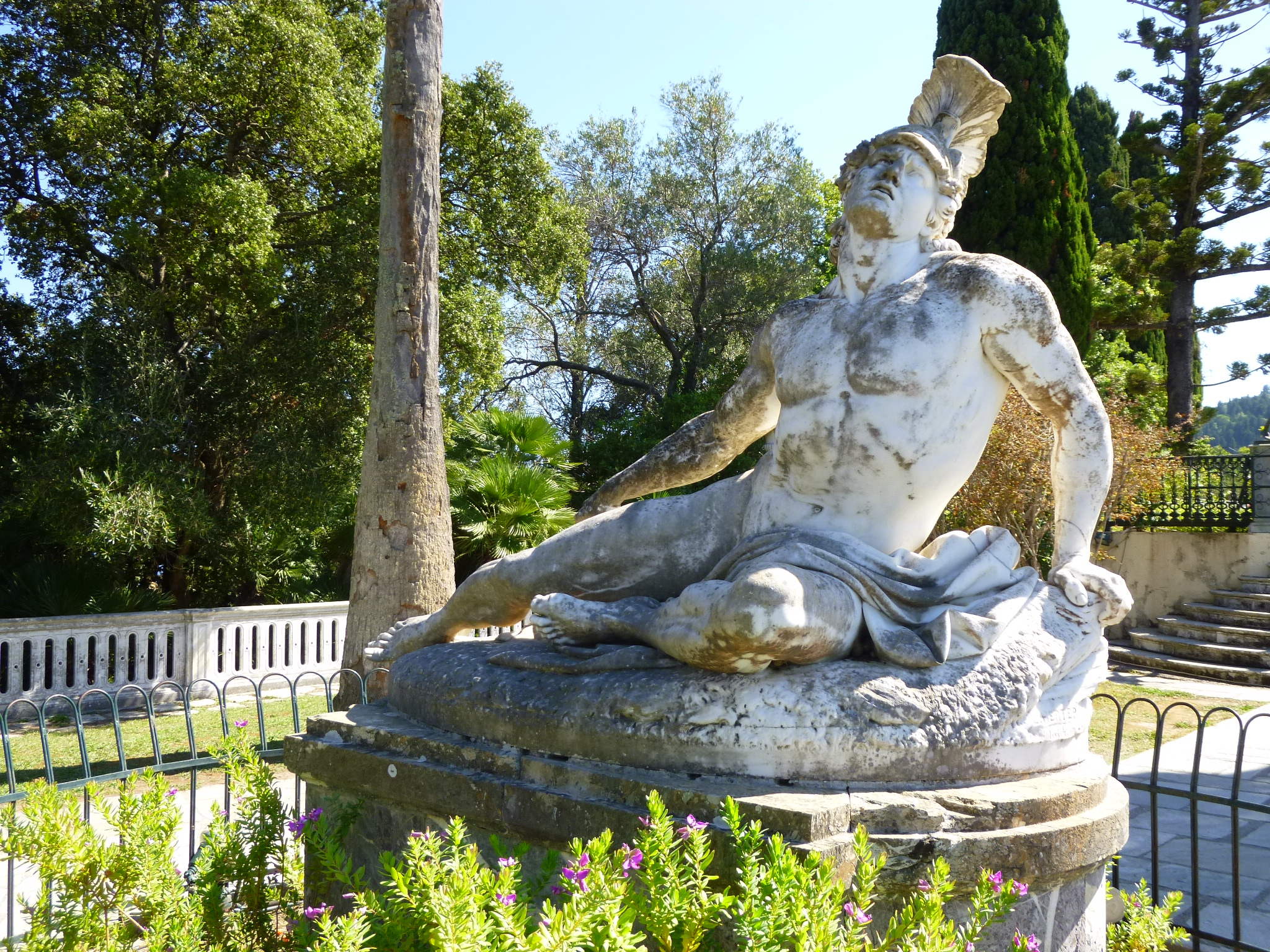 Die Statue des sterbenden Achilles im Garten des Achilleion, Korfu, Griechenland